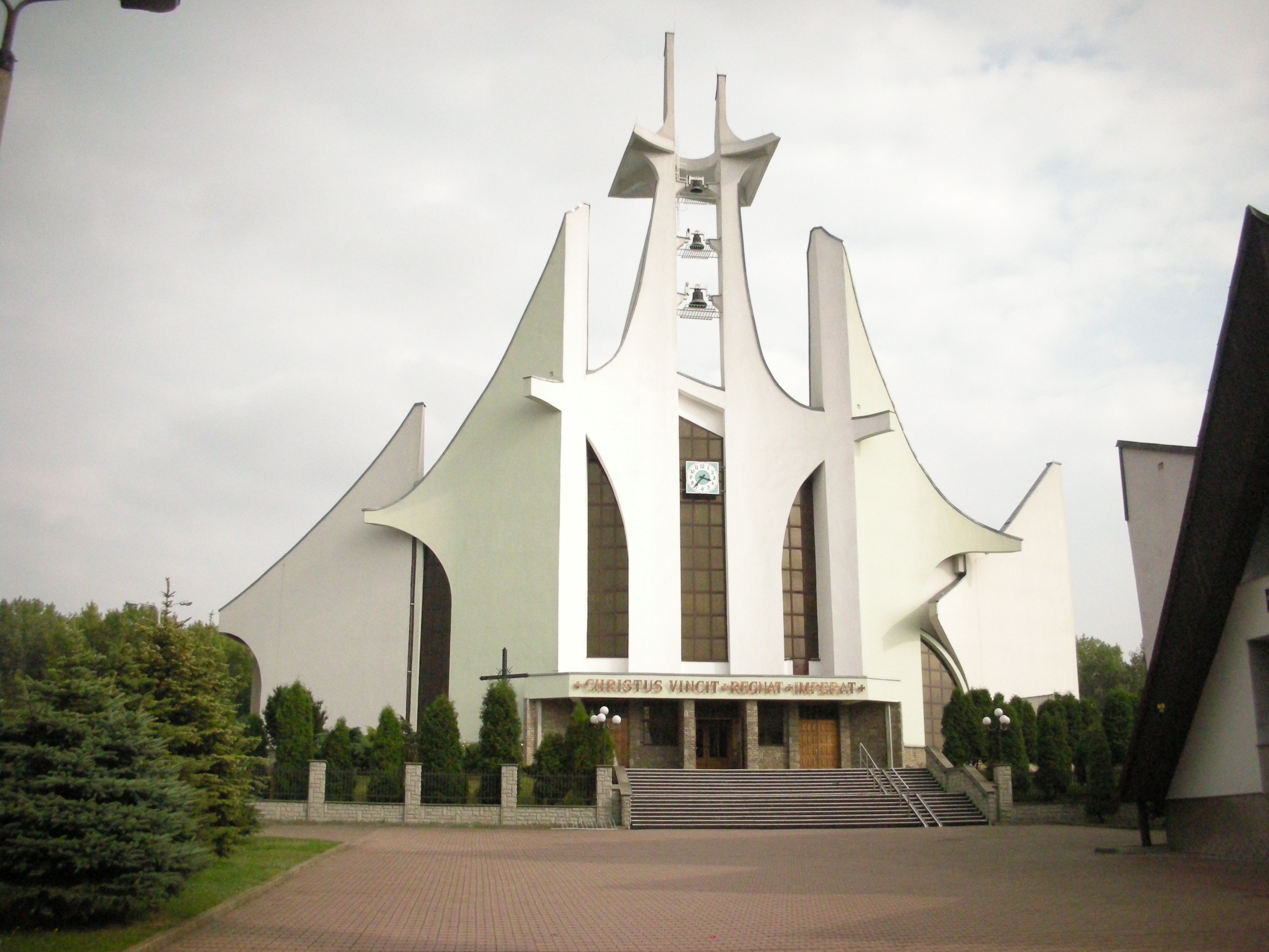 koscioł pod wezwaniem Chrystusa Króla Na Hołdunowie (Lędziny)